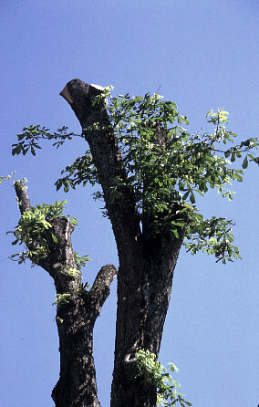 Kappung